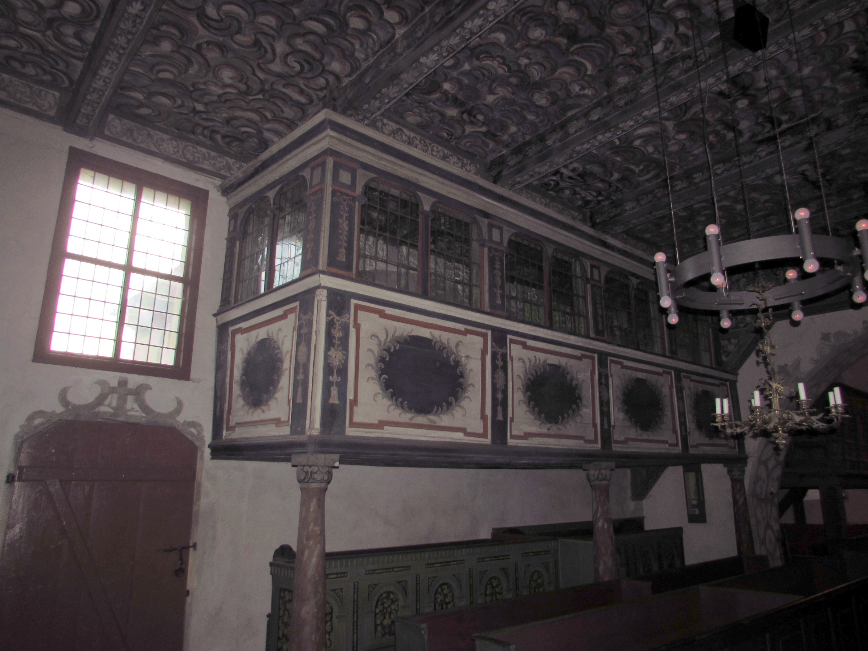 patronatsloge dorfkirche ketzür